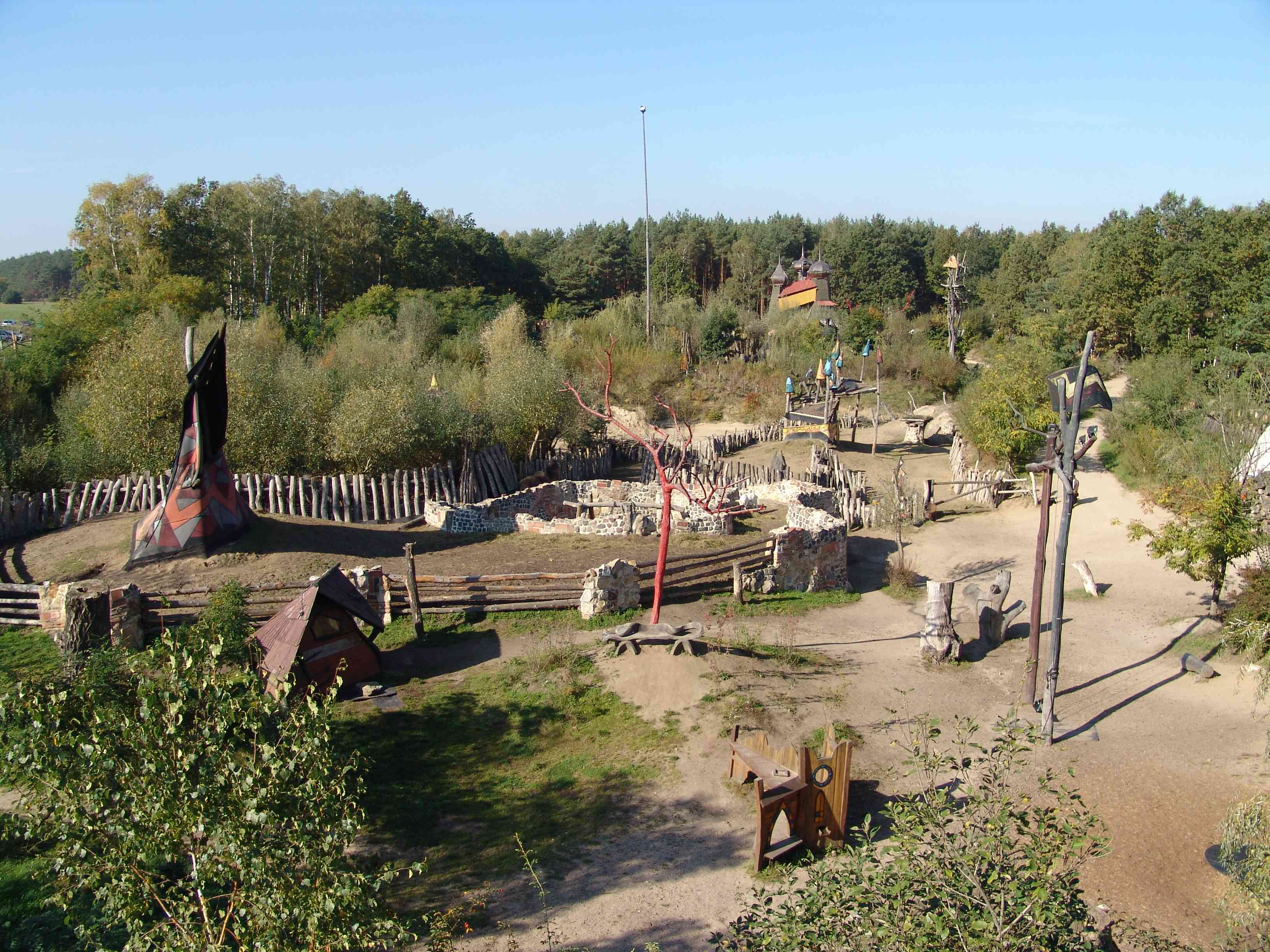 Kulturinsel Einsiedel in Zentendorf (Deutschland)